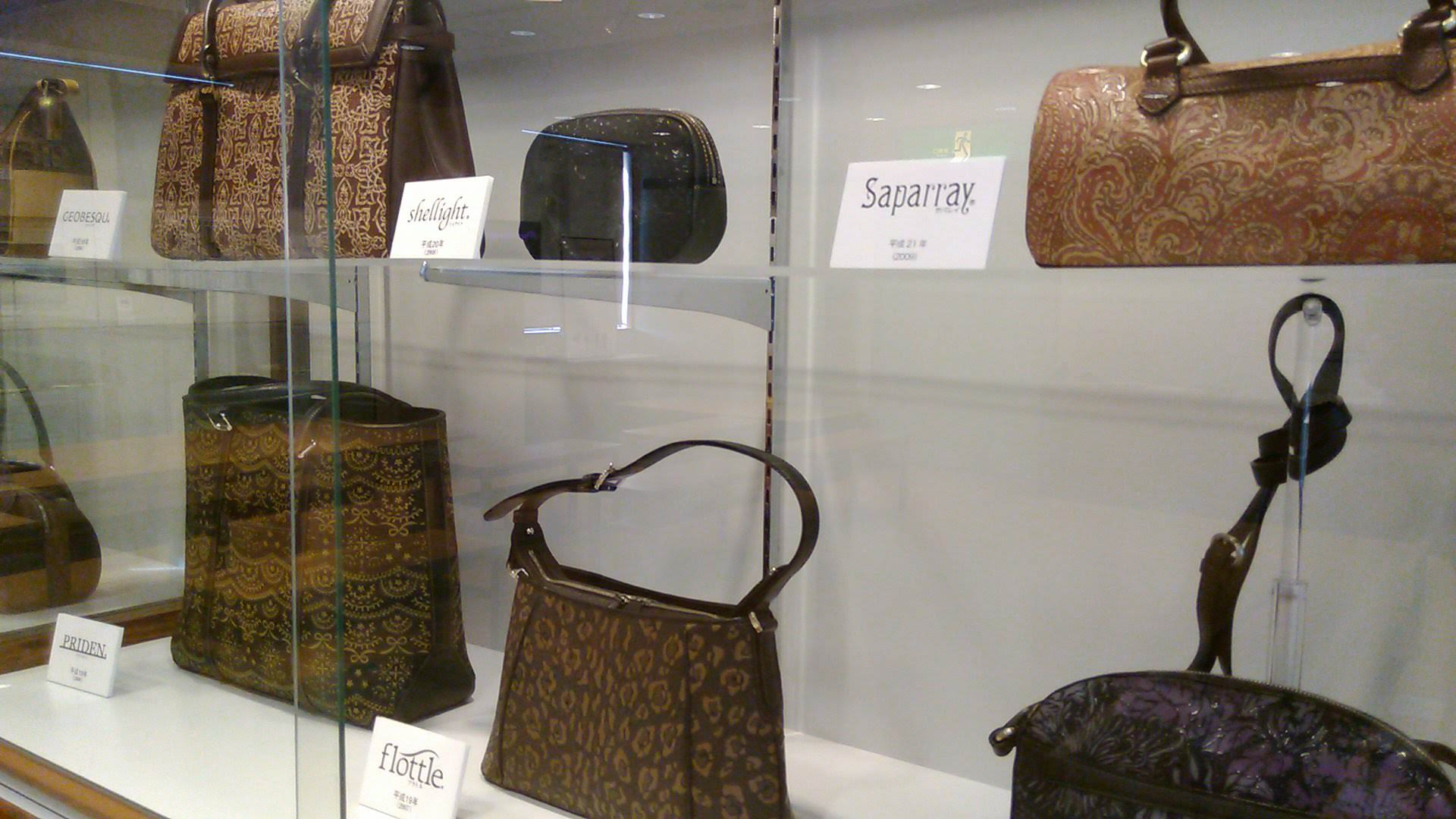 印傳屋の印傳（甲府市）